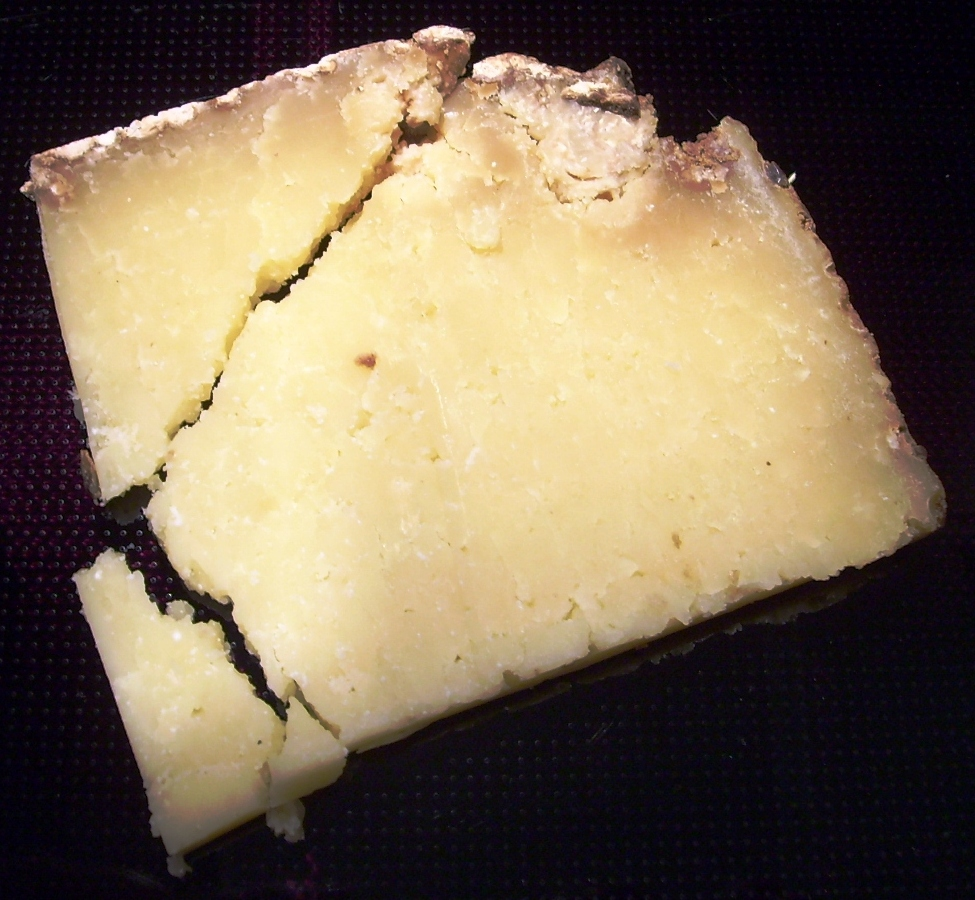 Cantal. Französischer Käse aus der Auvergne, AOC. 24 Monate gereift.